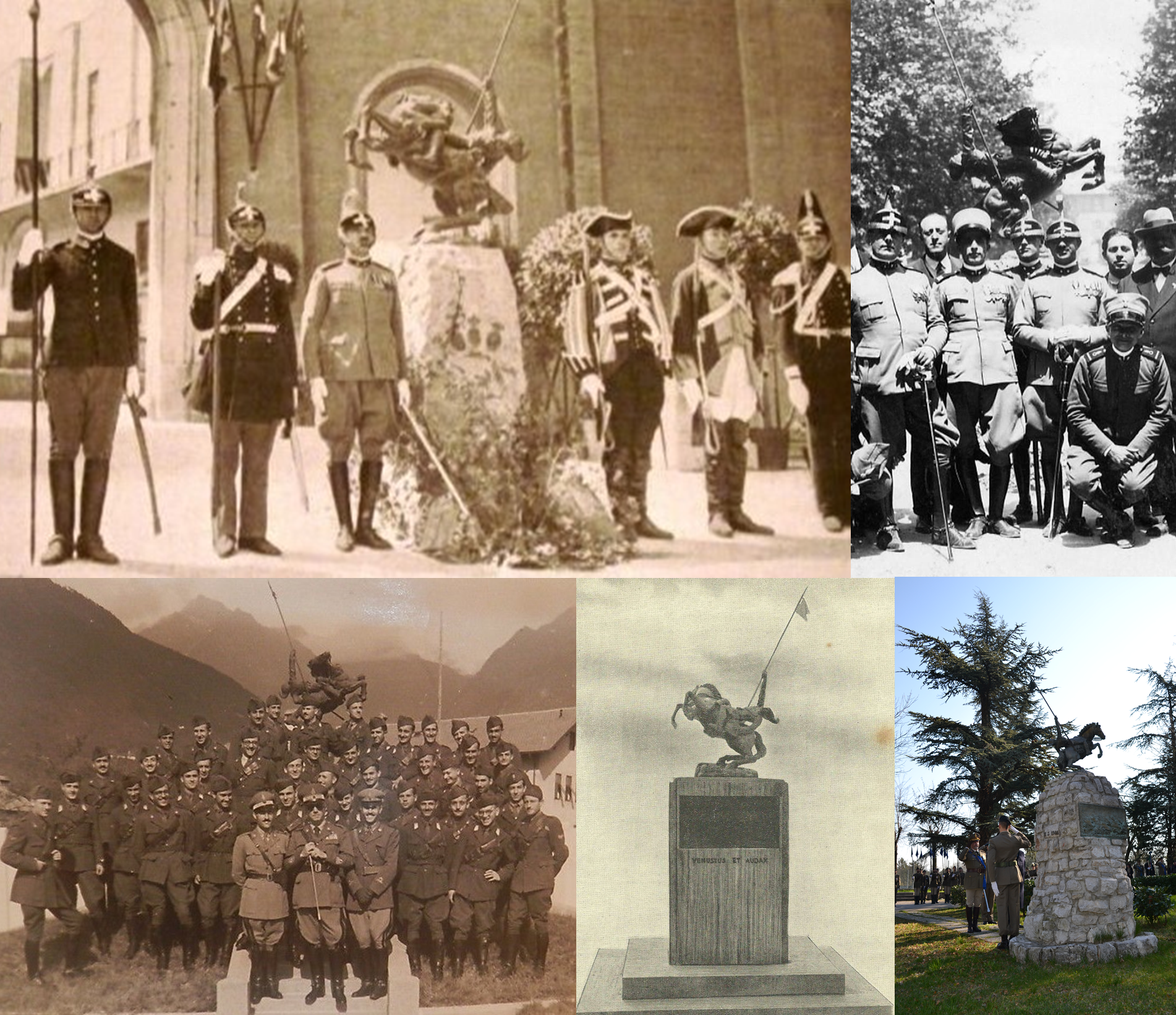 Piemonte Cavalleria. Monumento ai caduti, detto del Cavaliere Morente. Le due immagini in alto si riferiscono alla caserma del Macao in Roma, le tre in basso, rispettivamente, alle guarnigioni di Merano, Firenze e Opicina di Trieste